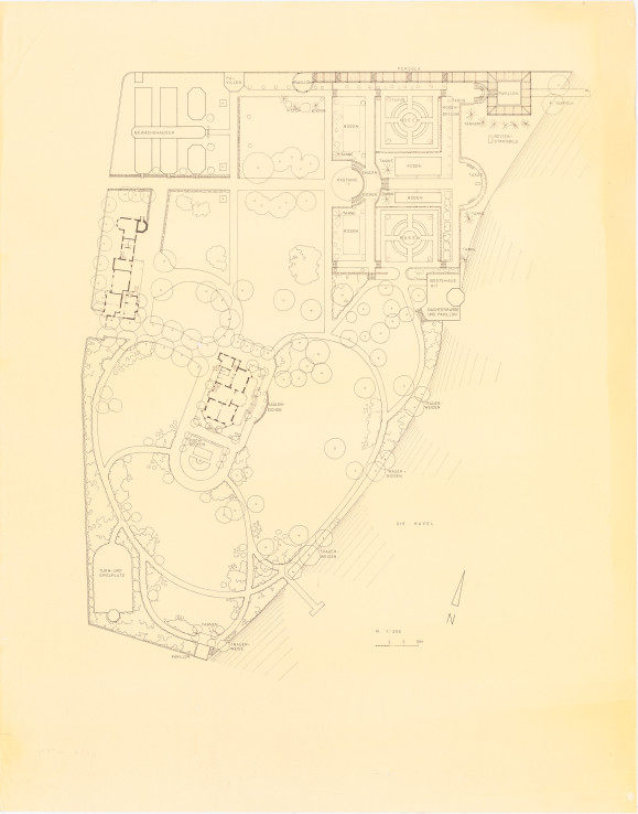 Plan der Gartenanlage der Villa Lemm bin Berlin-Gatow, erstellt durch die Abteilung für Gartengestaltung